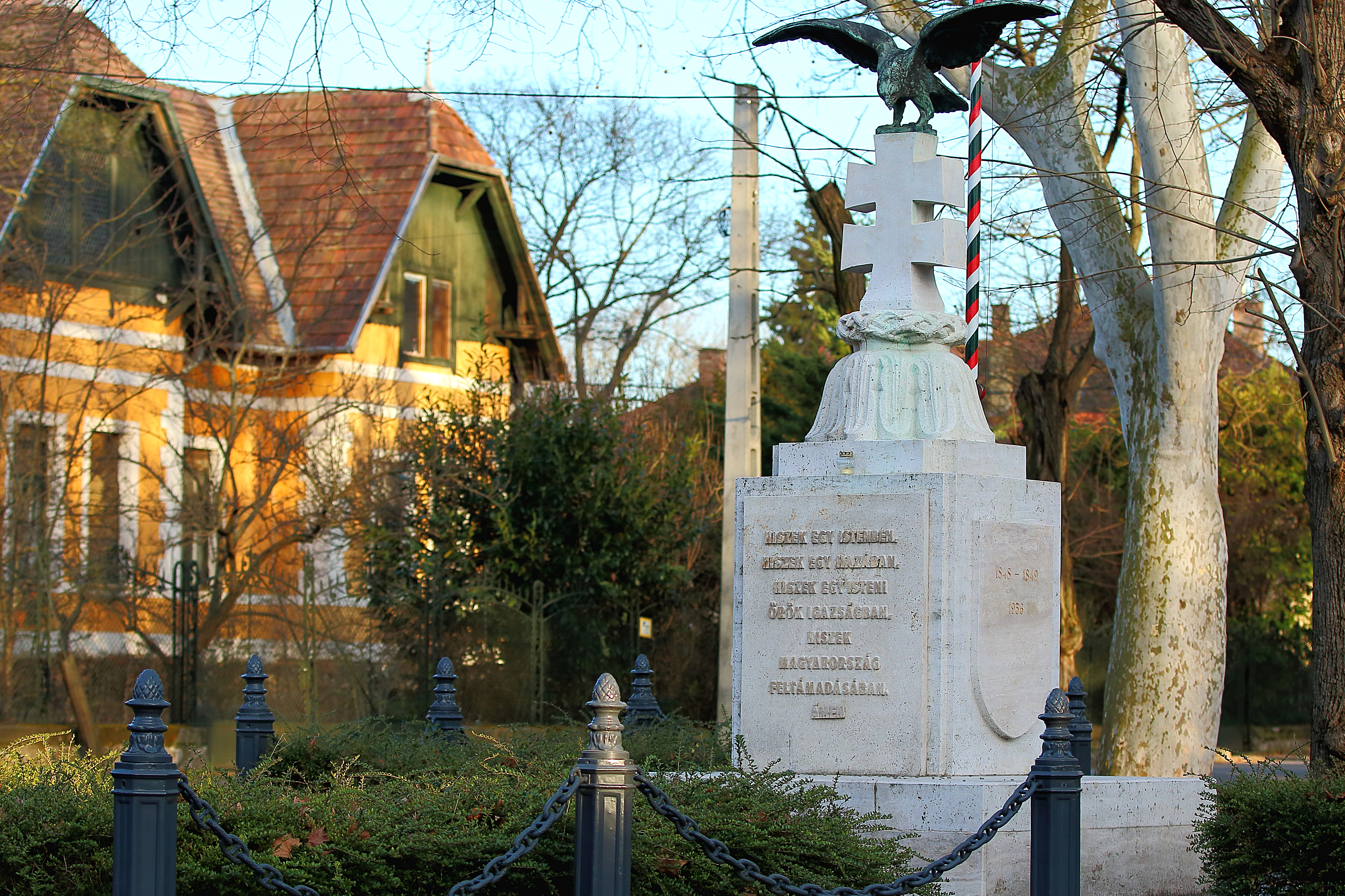 Mátyásföldi kombinált emlékmű